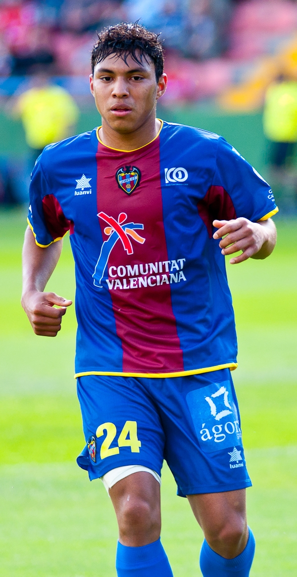 El jugador granota Jefferson Antonio Montero Vite